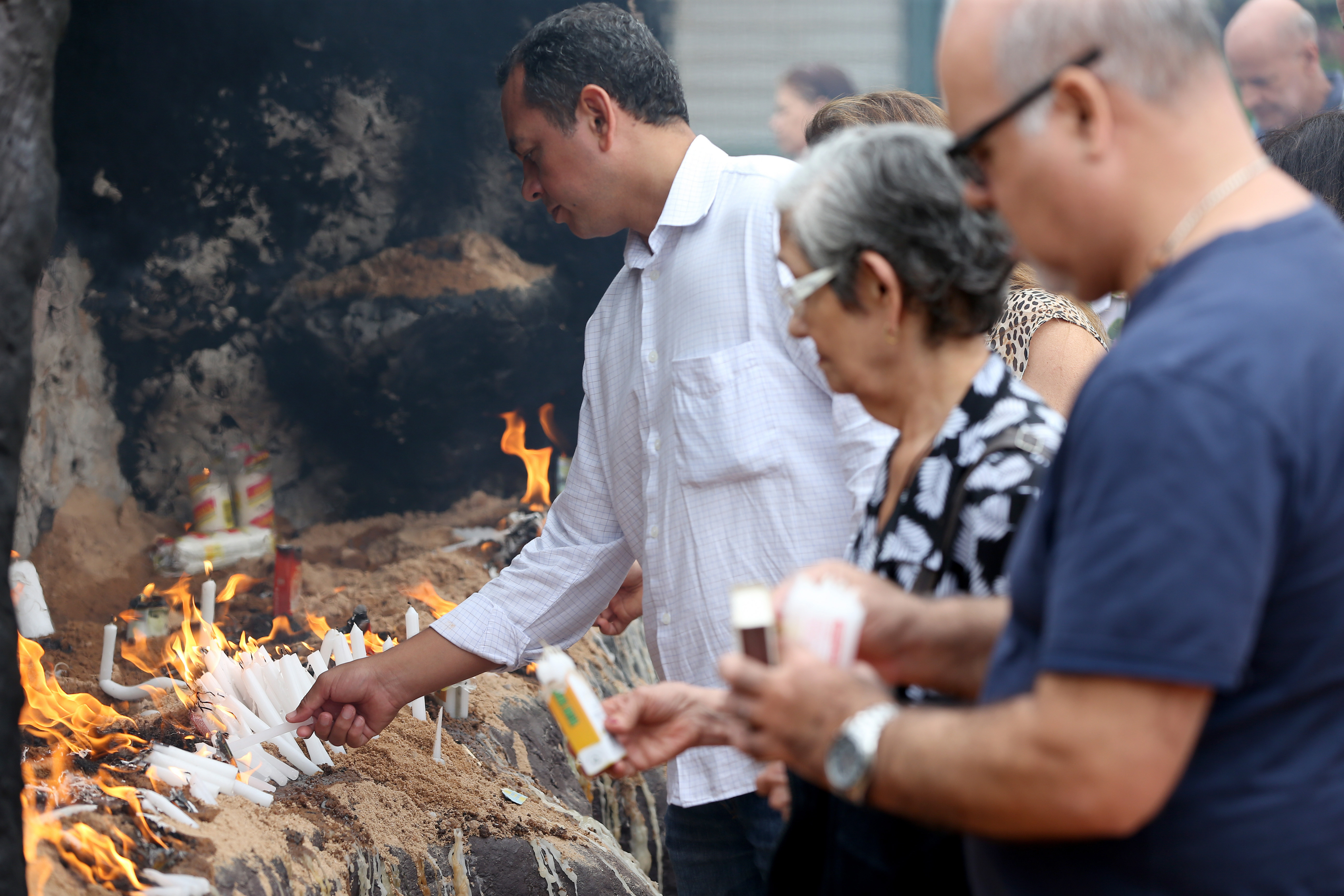 Brasília - Movimentação no Cemitério Campo da Esperança no dia de Finados (Wilson Dias/Agência Brasil)